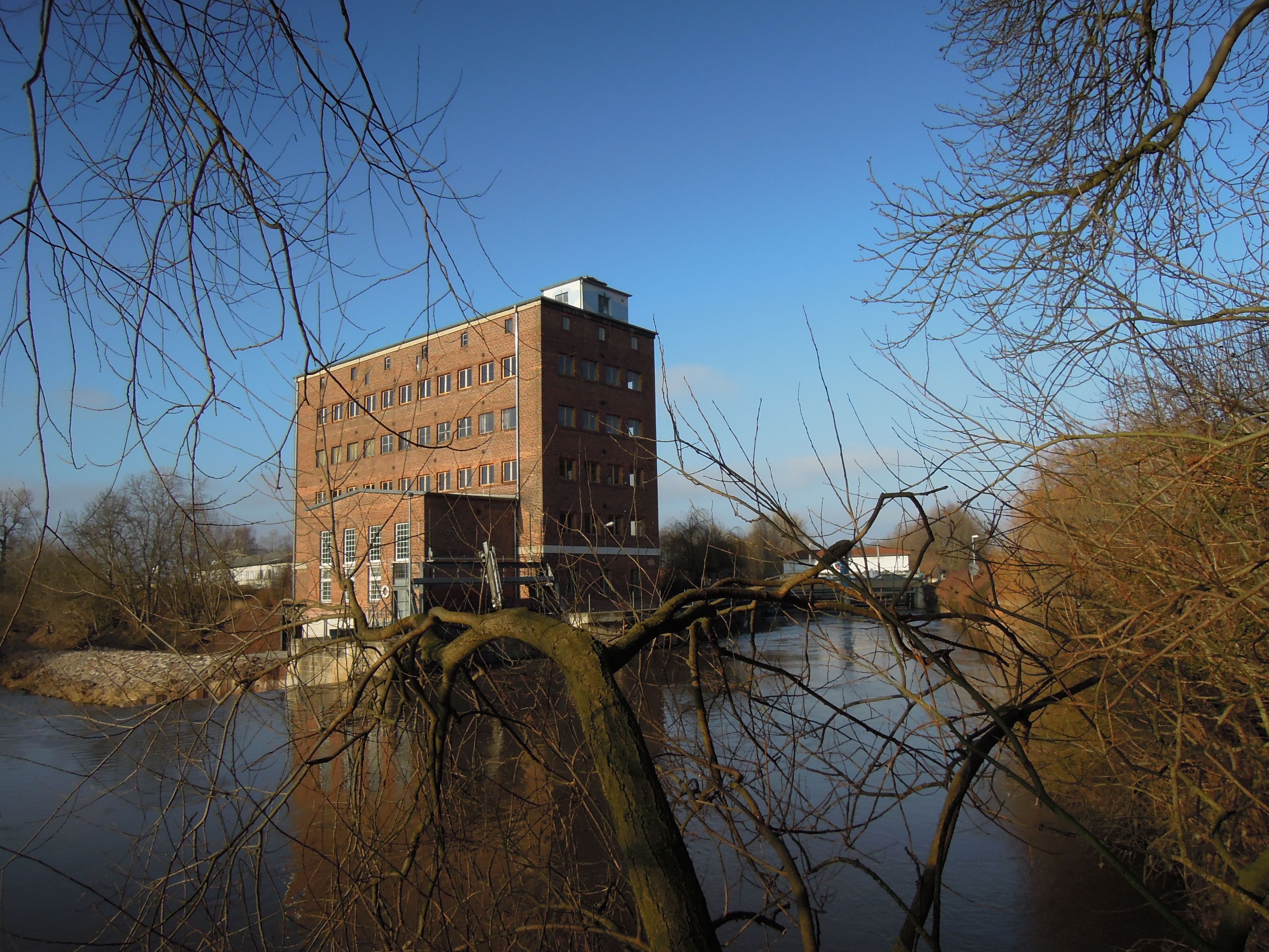 Weißenfelser Herrenmühle (Blick von Südost) 2015